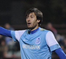 Дмитрий Безотосный